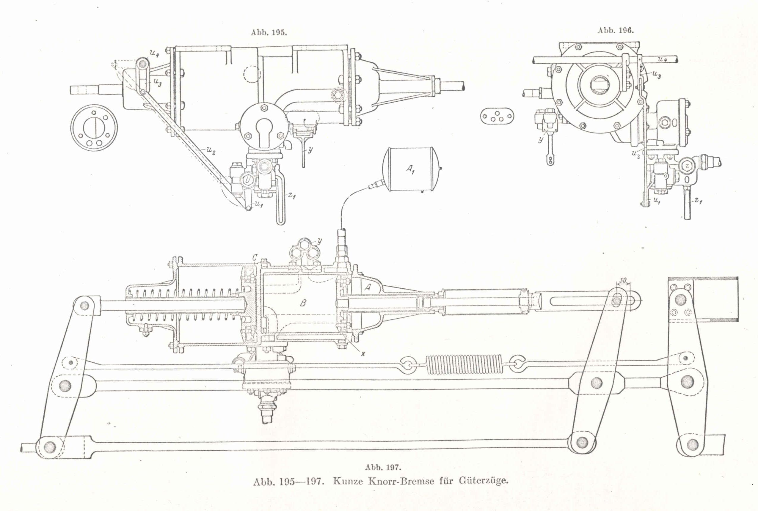 KKg_Zeichnung.jpg